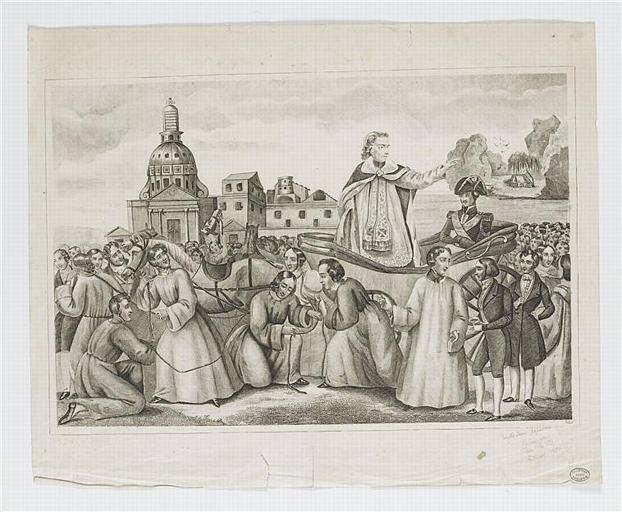 Retour de Pie VII à Rome